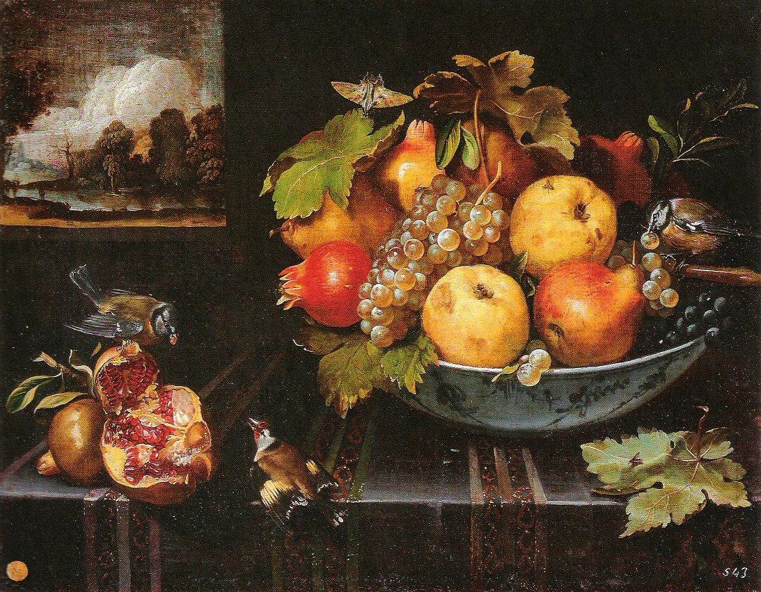 Juan van der Hamen y León, Stillleben mit Obstschale, Vögeln und Fensterausblick, 56 x 74 cm, signiert, 1623, El Escorial, Monasterio de San Lorenzo